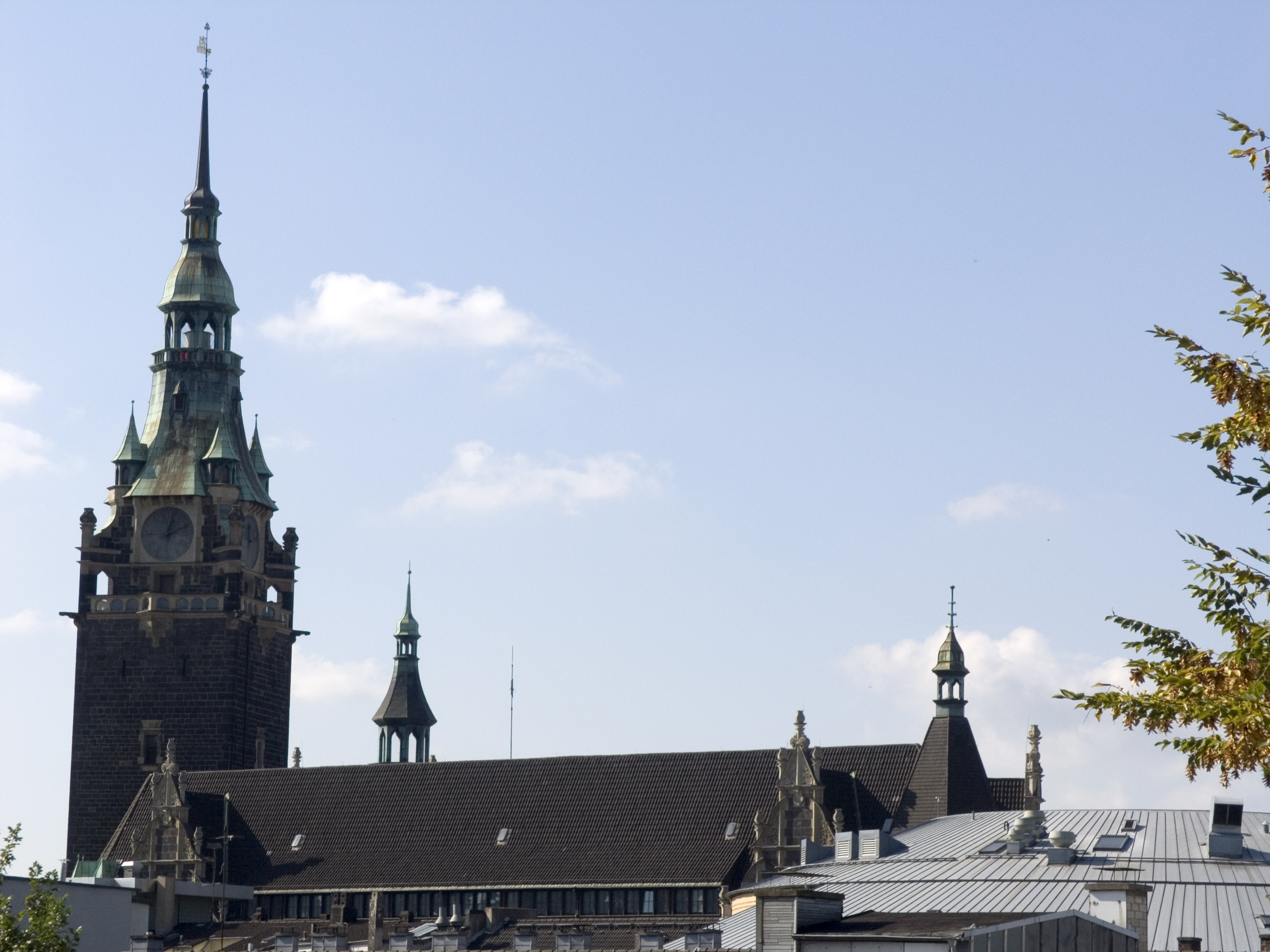 Северный Рейн-Вестфалия. Ратуша Эльберфельда в Вуппертале